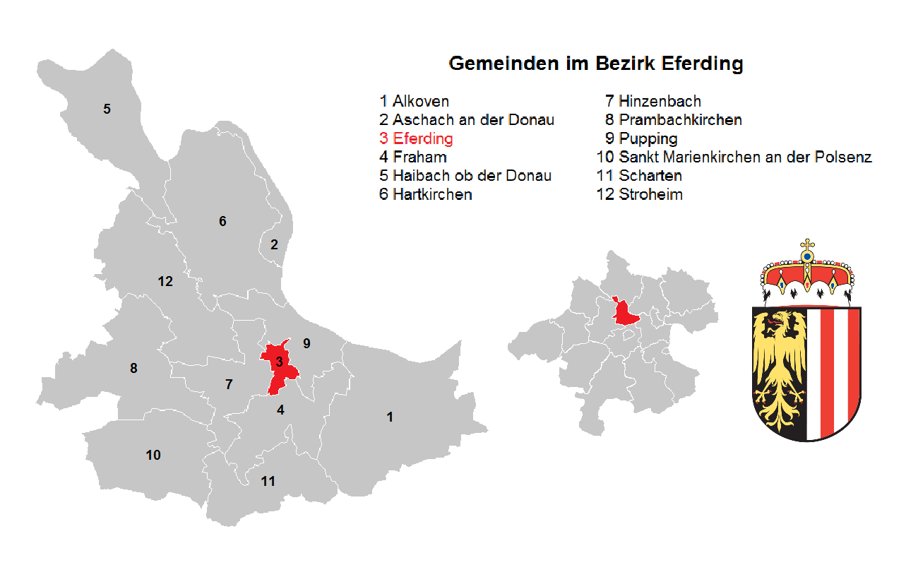 Bezirk Eferding